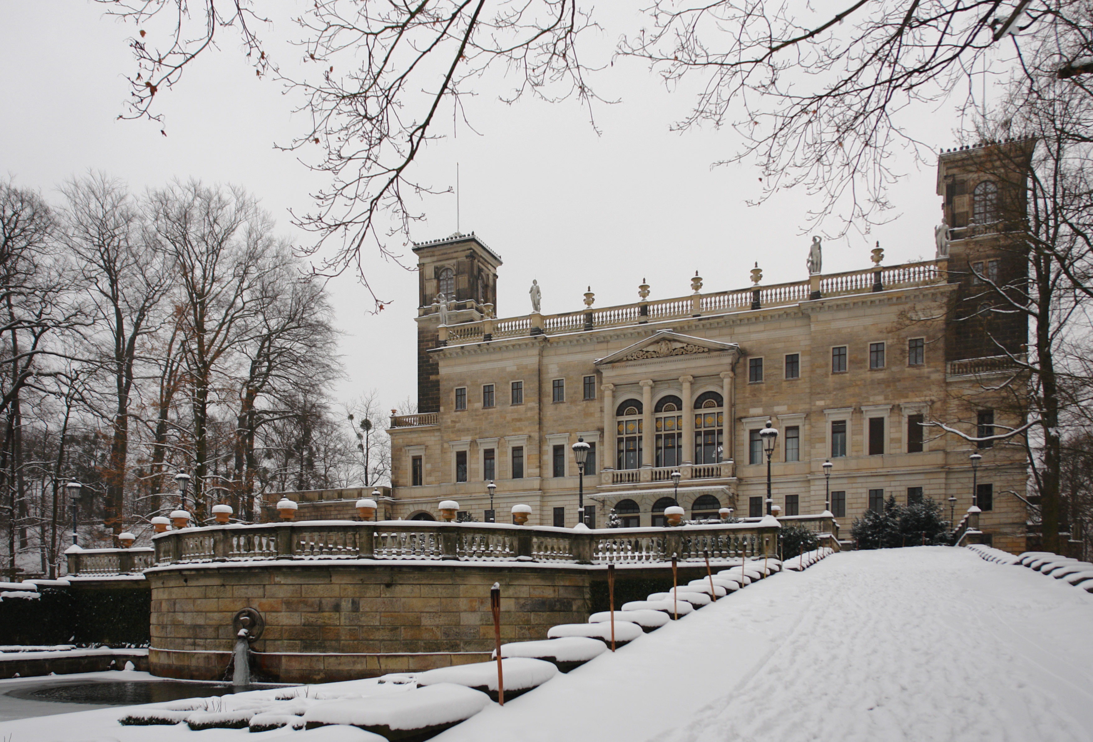 Schloss Albrechtsberg im Winter